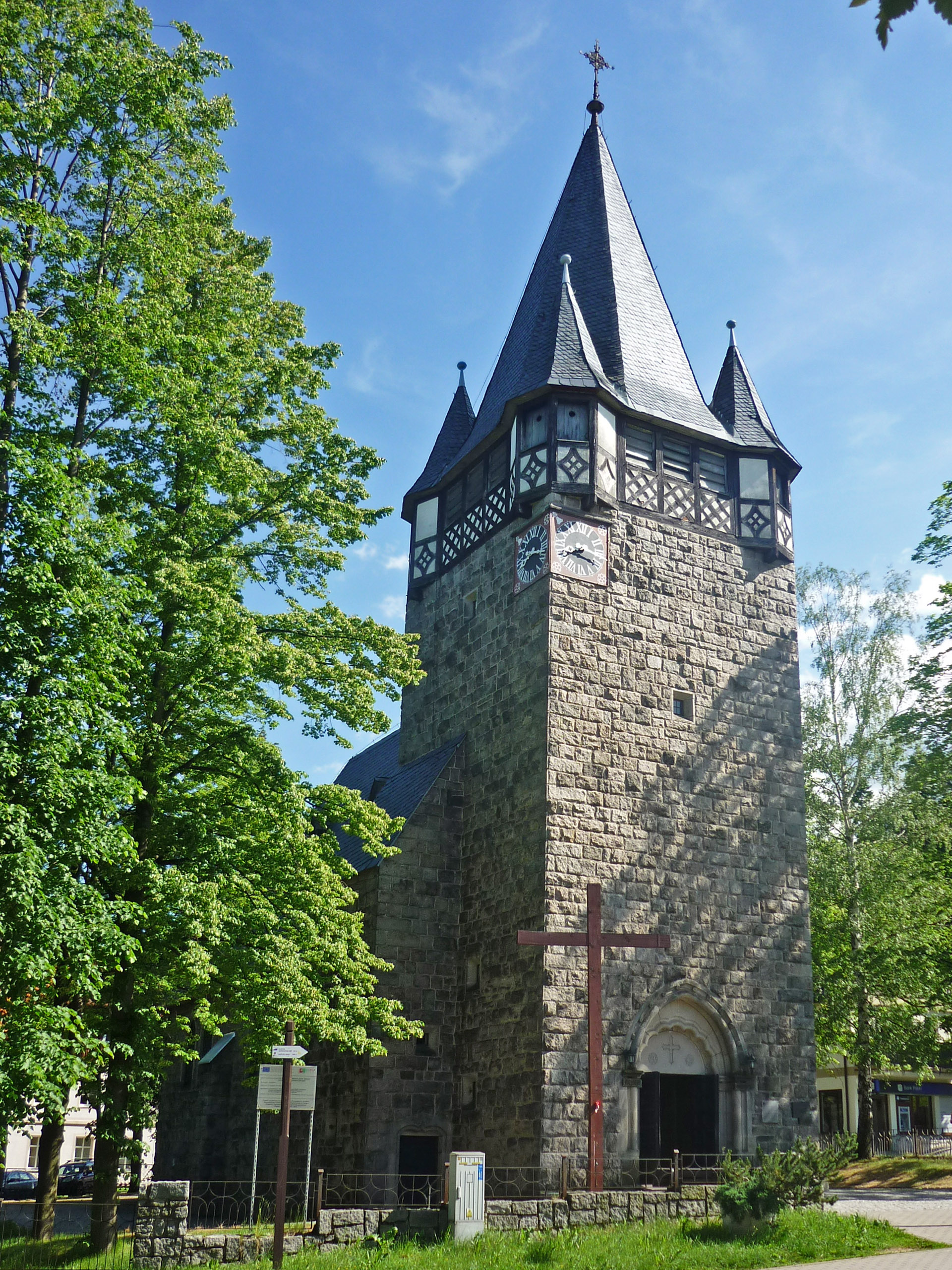 Herz-Jesu-Kirche in Krummhübel (Karpacz) im Riesengebirge, ehem. evangelische Kirche